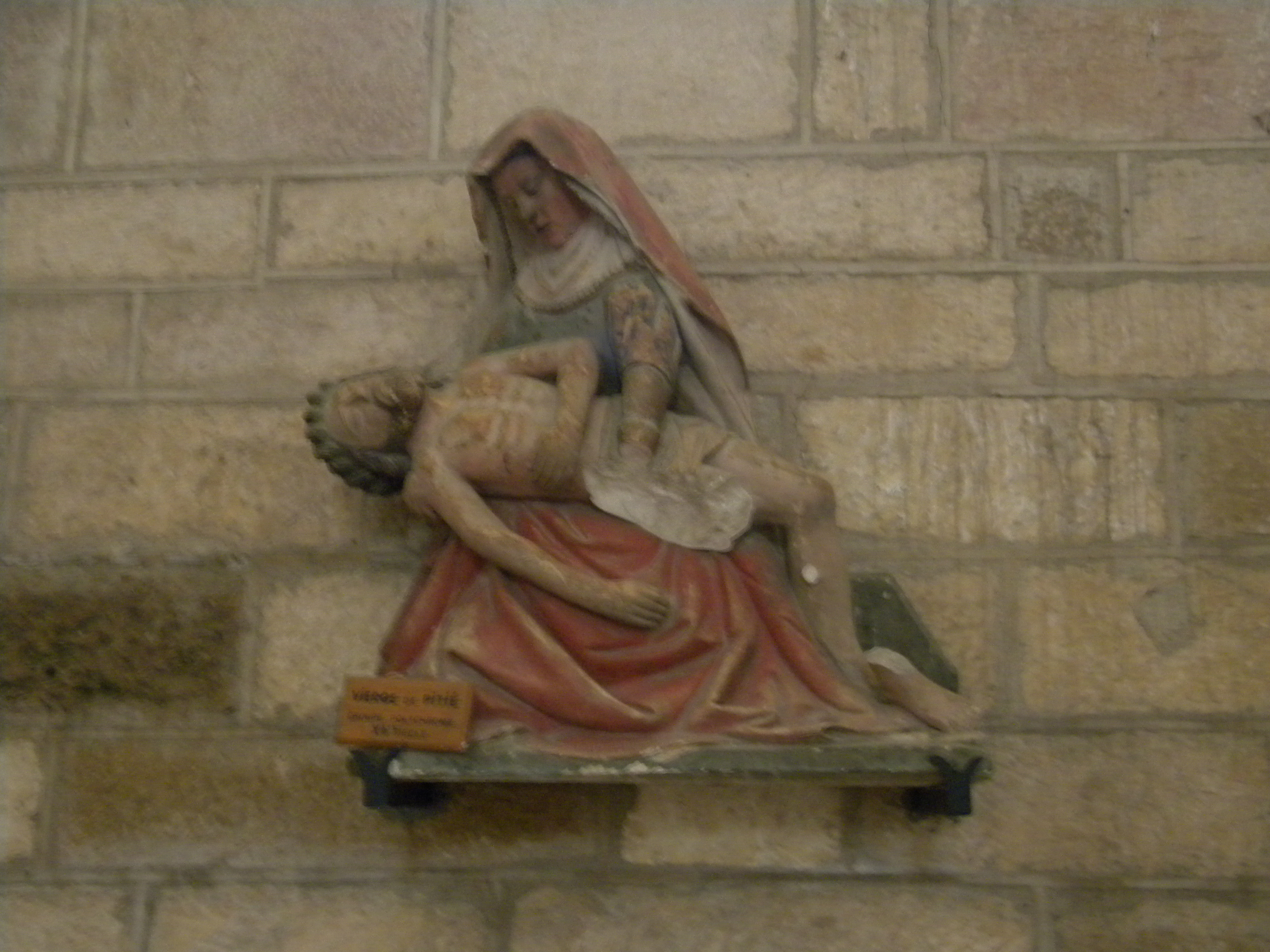 Rouvres-en-Plaine Vierge de pitié